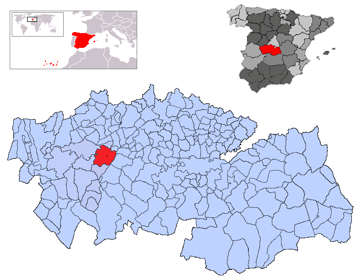 La Pueblanueva en la provincia de Toledo